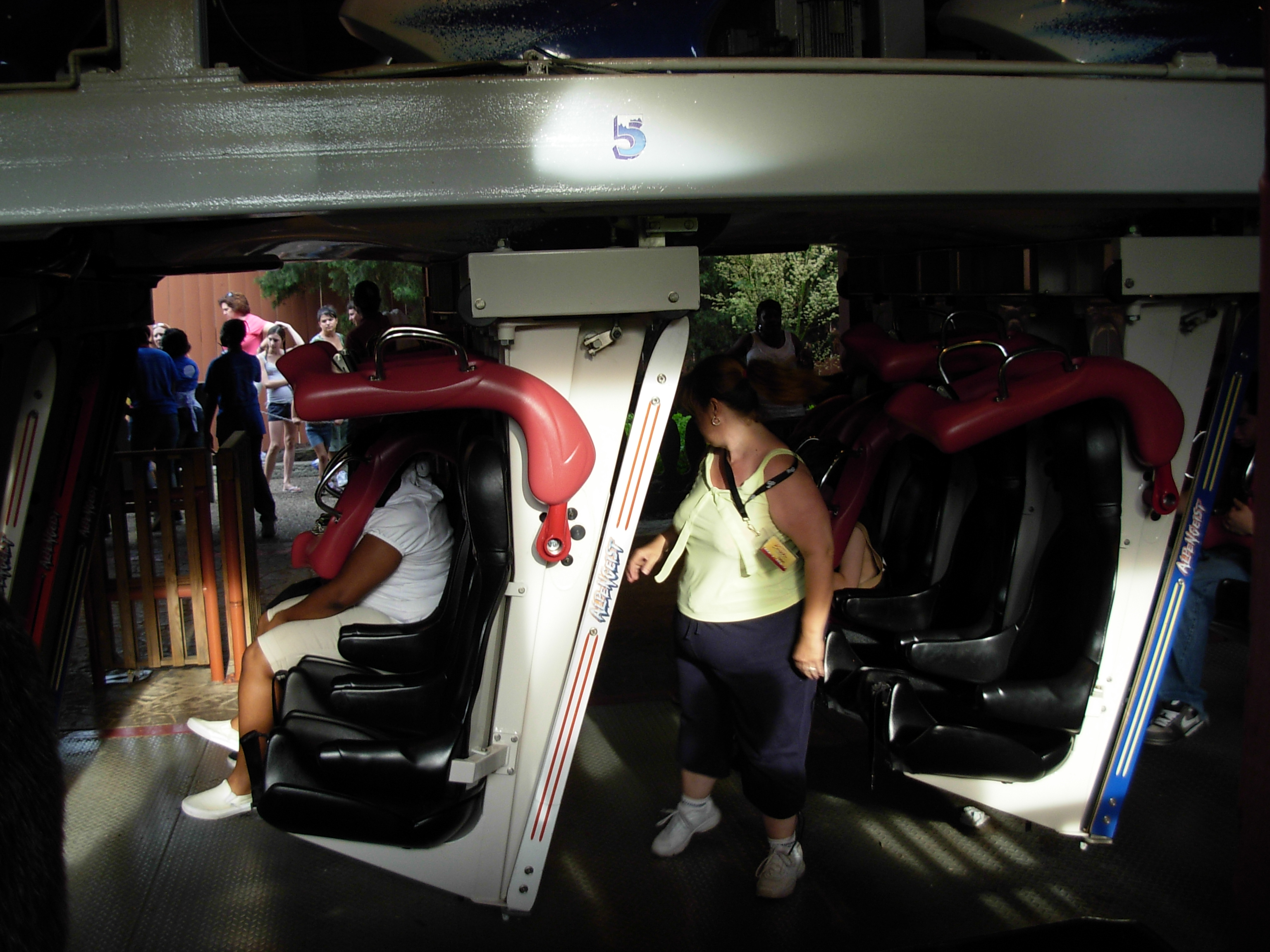 Busch Gardens Europe, Williamsburg Roller coasters Amusement rides